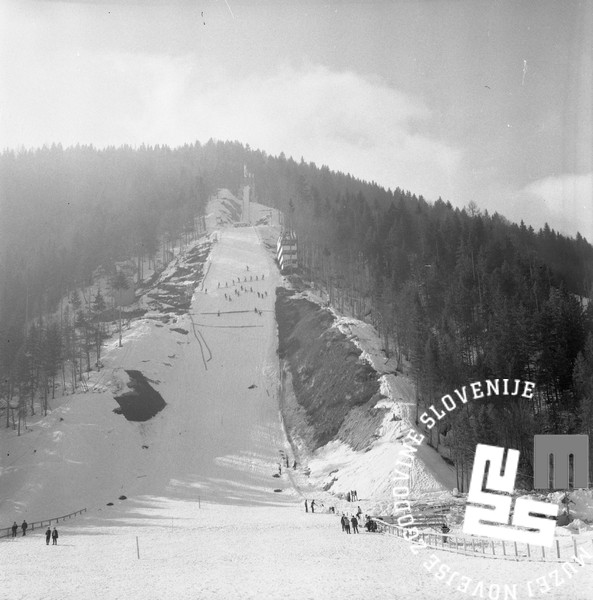 Planica z novo velikanko in rekordom.